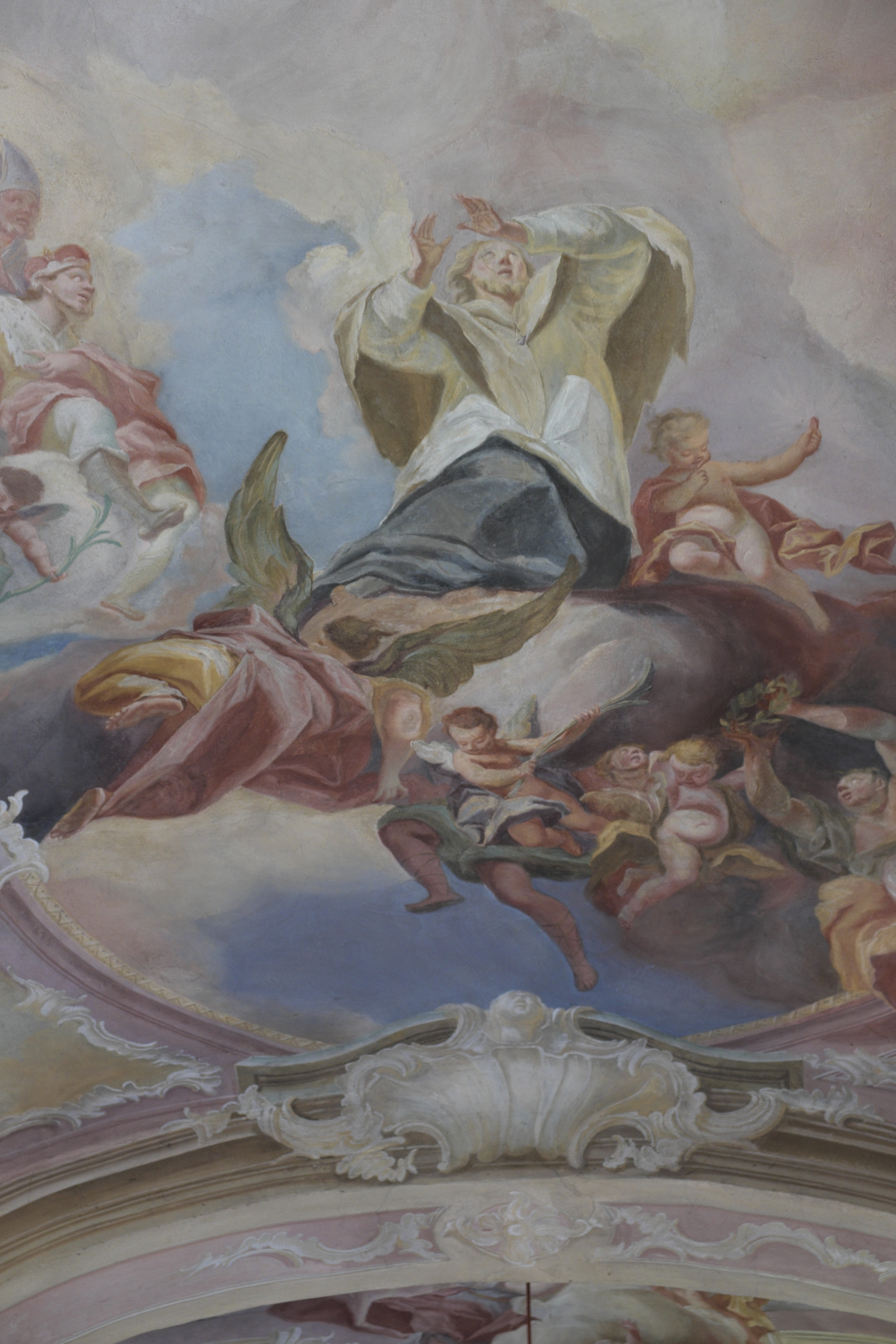 Ehemalige Schlosskapelle St. Johann Nepomuk in Geiselbullach (Olching) im Landkreis Fürstenfeldbruck (Bayern, Deutschland), Deckenmalerei; Darstellung: Johannes Nepomuk